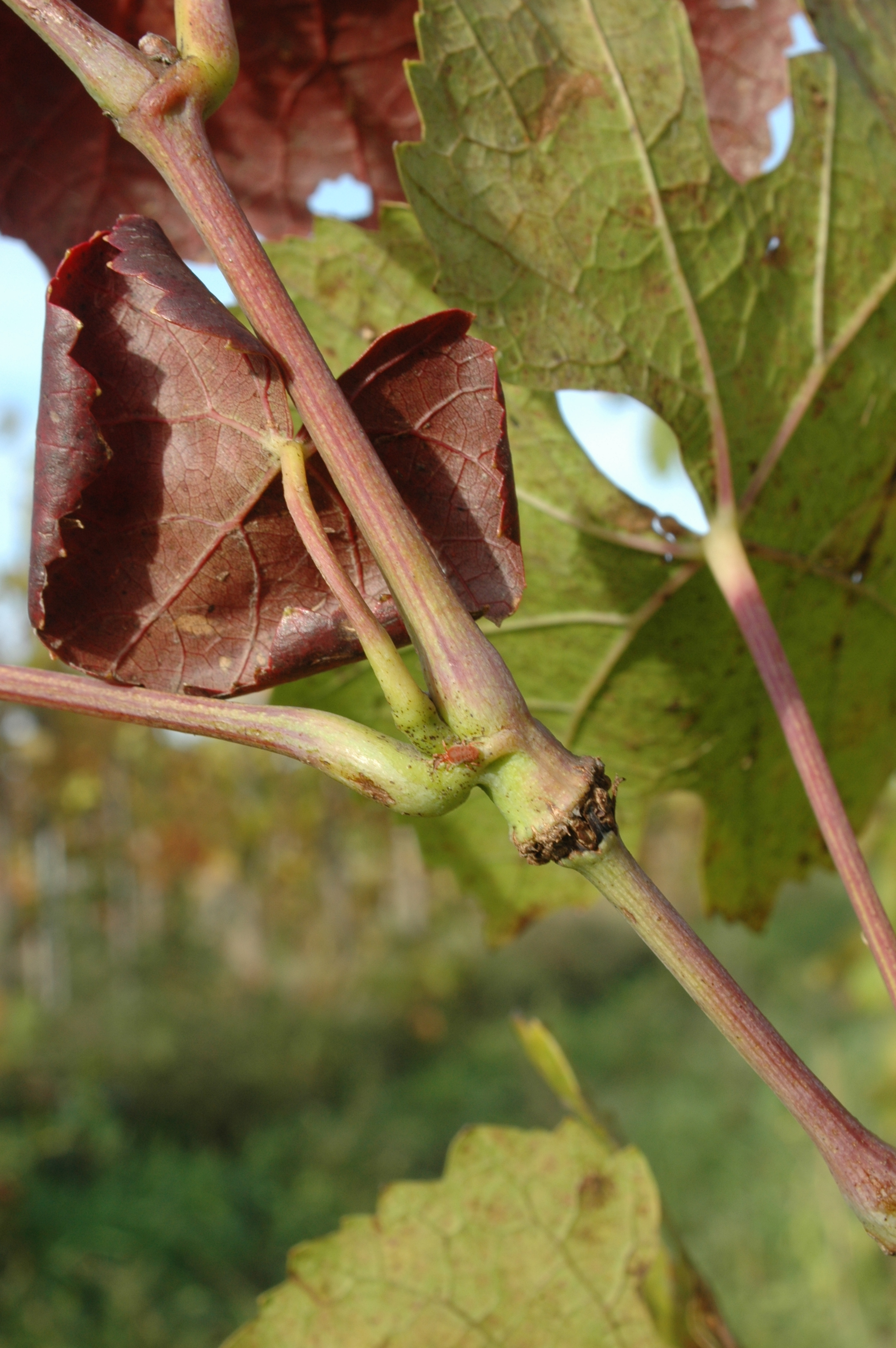 Triebschädigung der Büffelzikade an einem grünen Rebentrieb